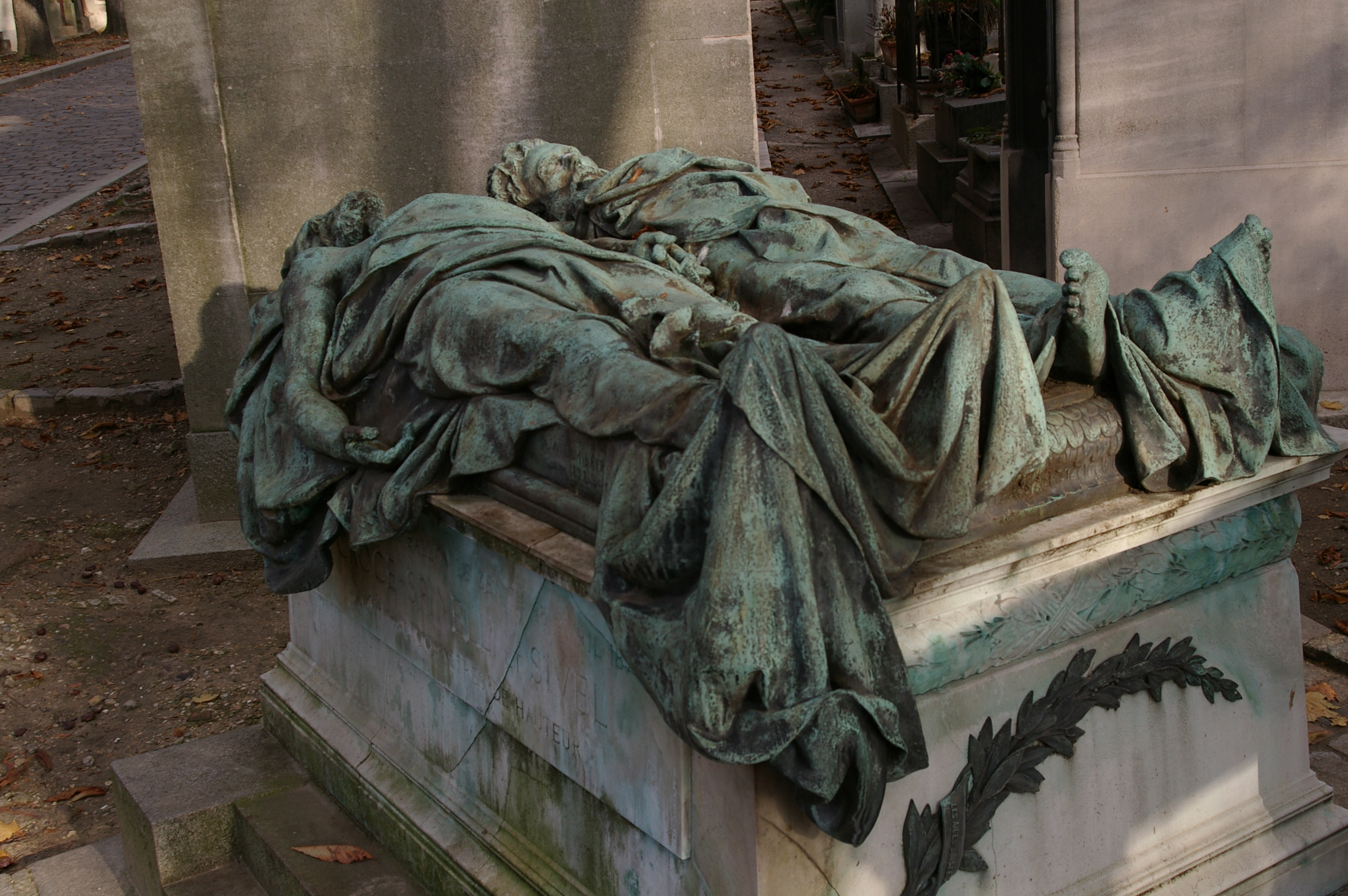 Tombe de Croce-Spinelli et Sivel, Père Lachaise ; monument ancien